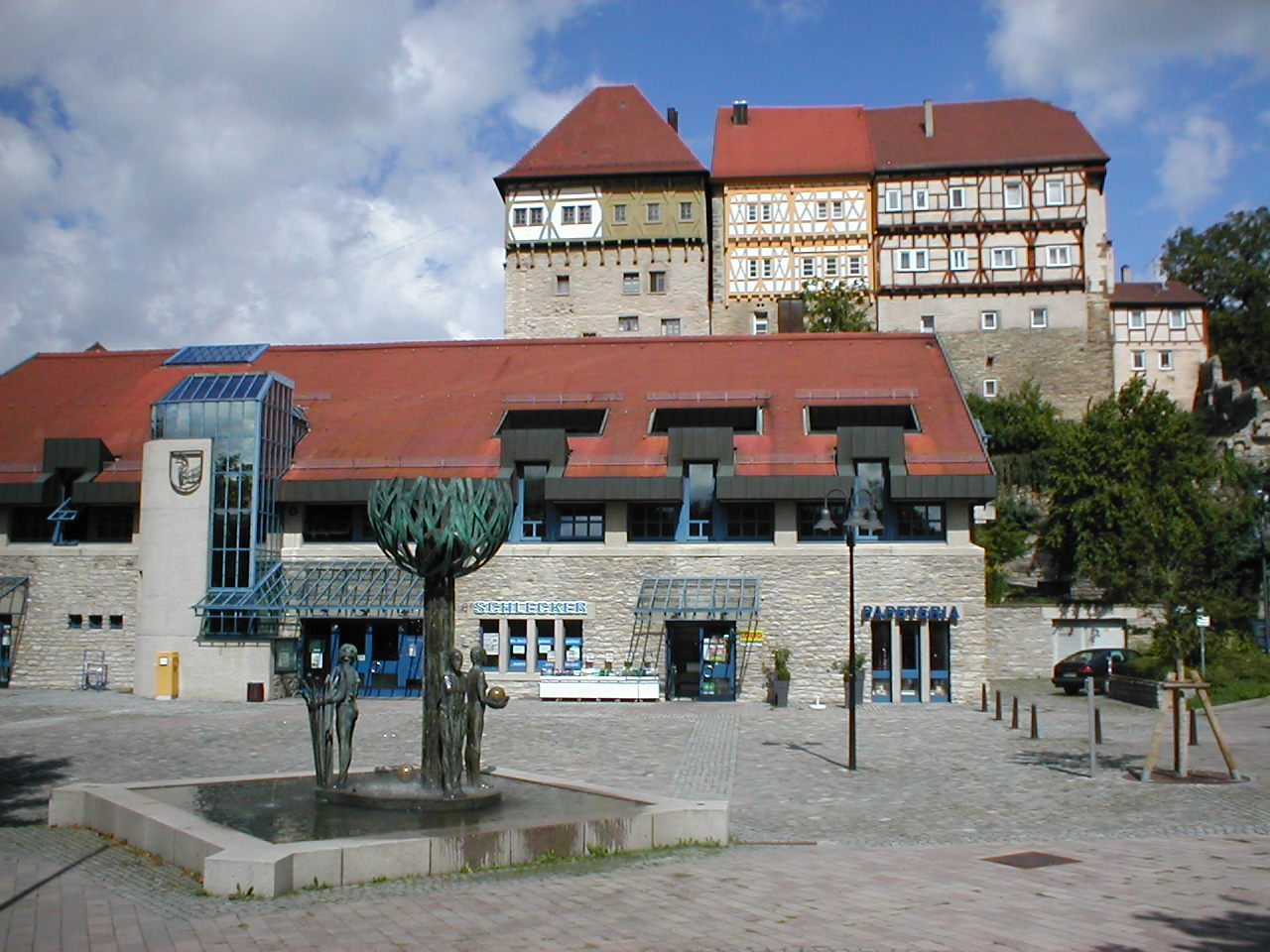 Das Obere Schloss in Talheim über dem Rathausplatz mit Jahreszeitenbrunnen